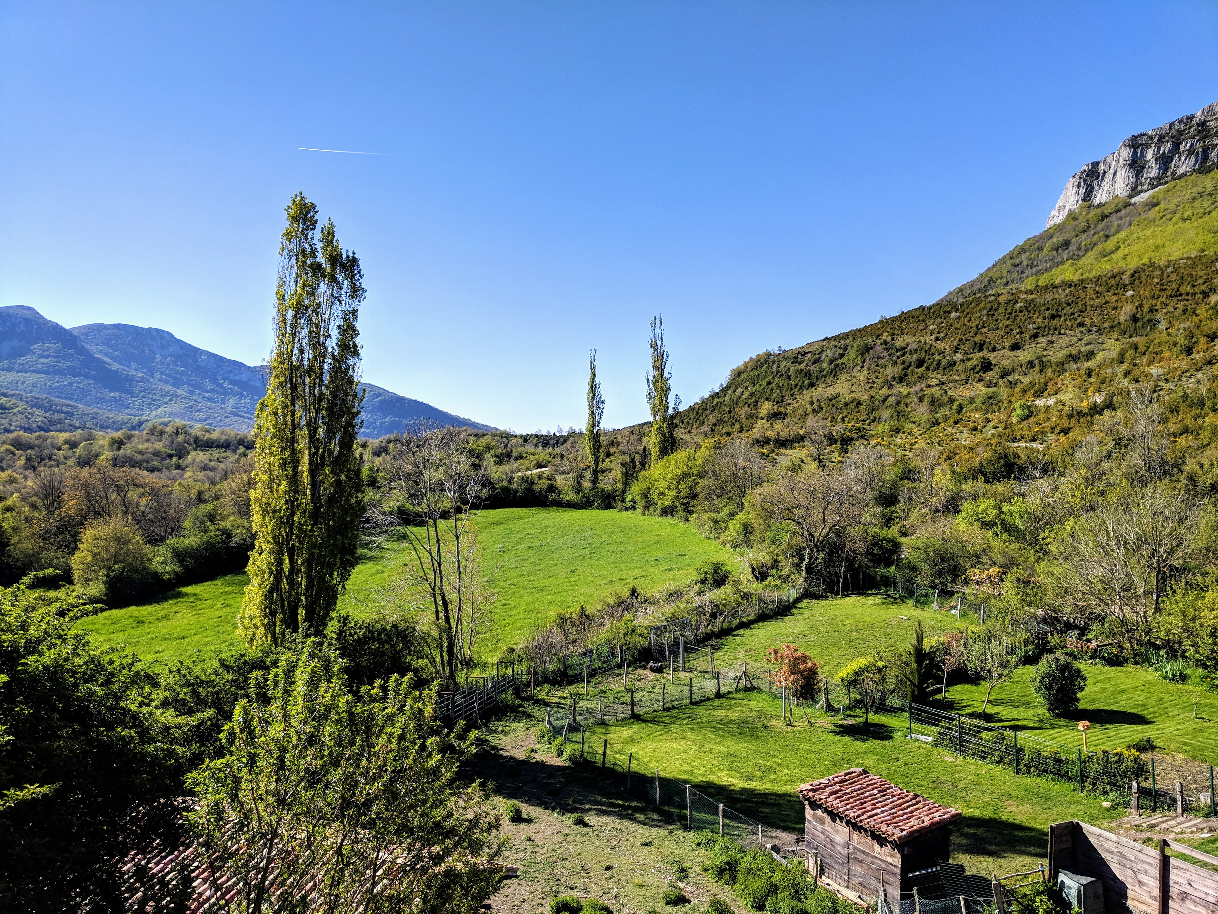 Vista del entorno de Saragüeta (Arce, Navarra).